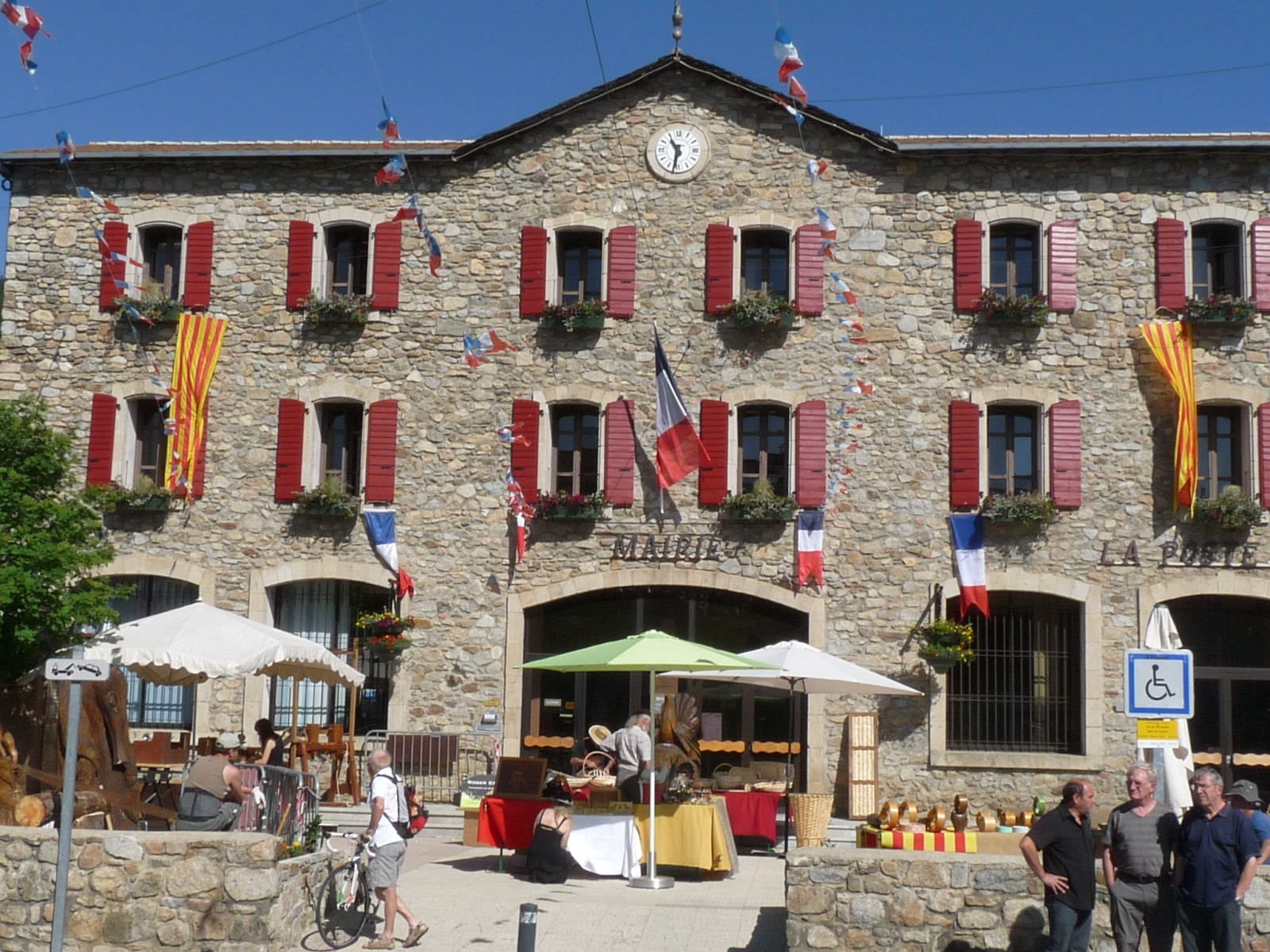 Mairie des Angles, Pyrénées-Orientales, France